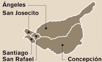 Mapa de los distritos del cantón de San Rafael, provincia de Heredia, Costa Rica.